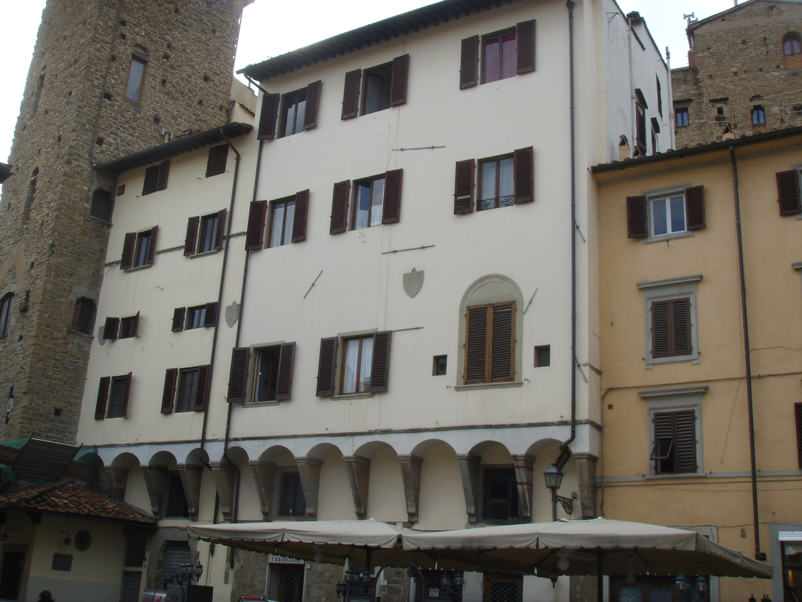 Case dei corbizi